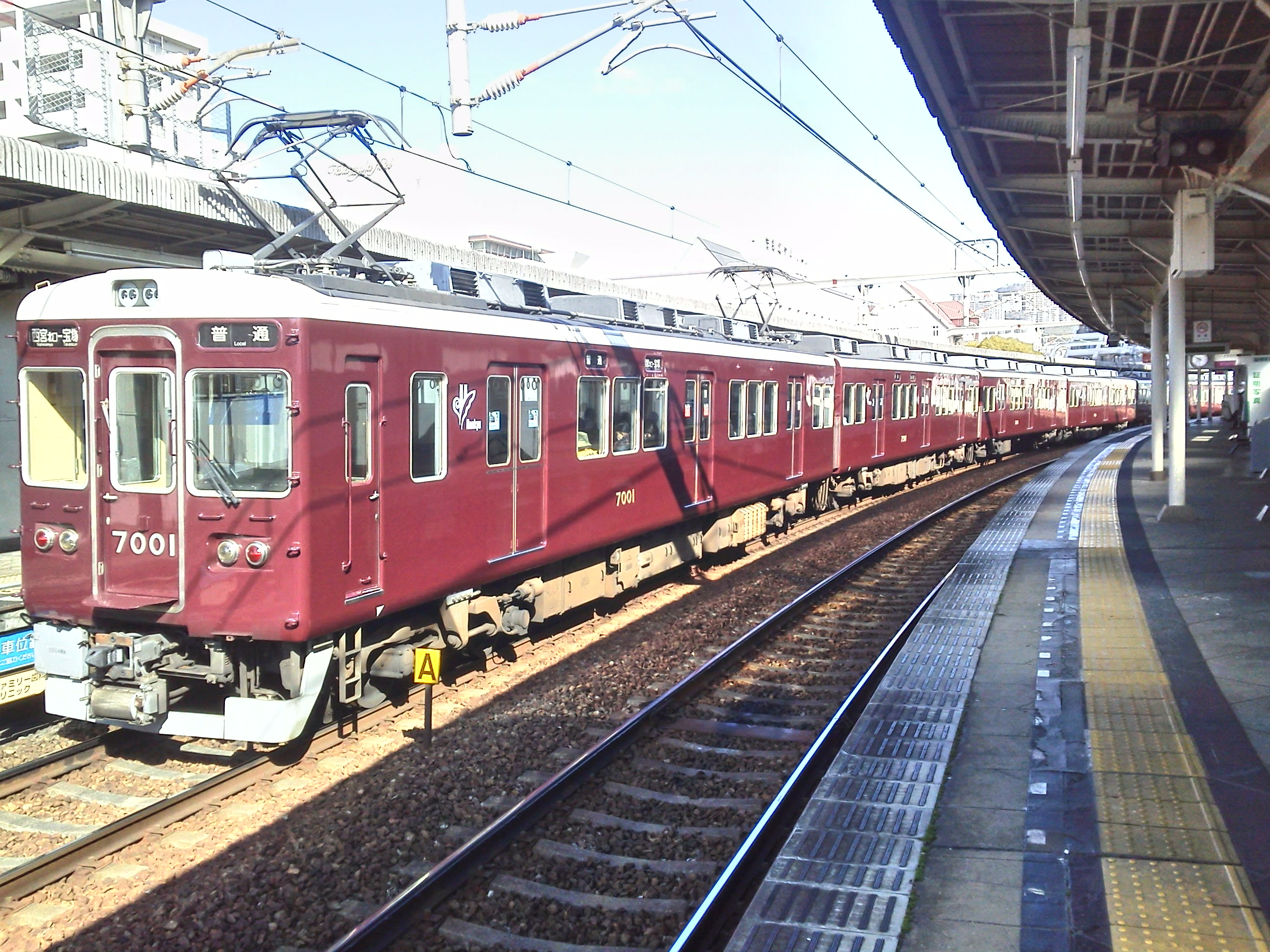 今津北線で運用する7001F